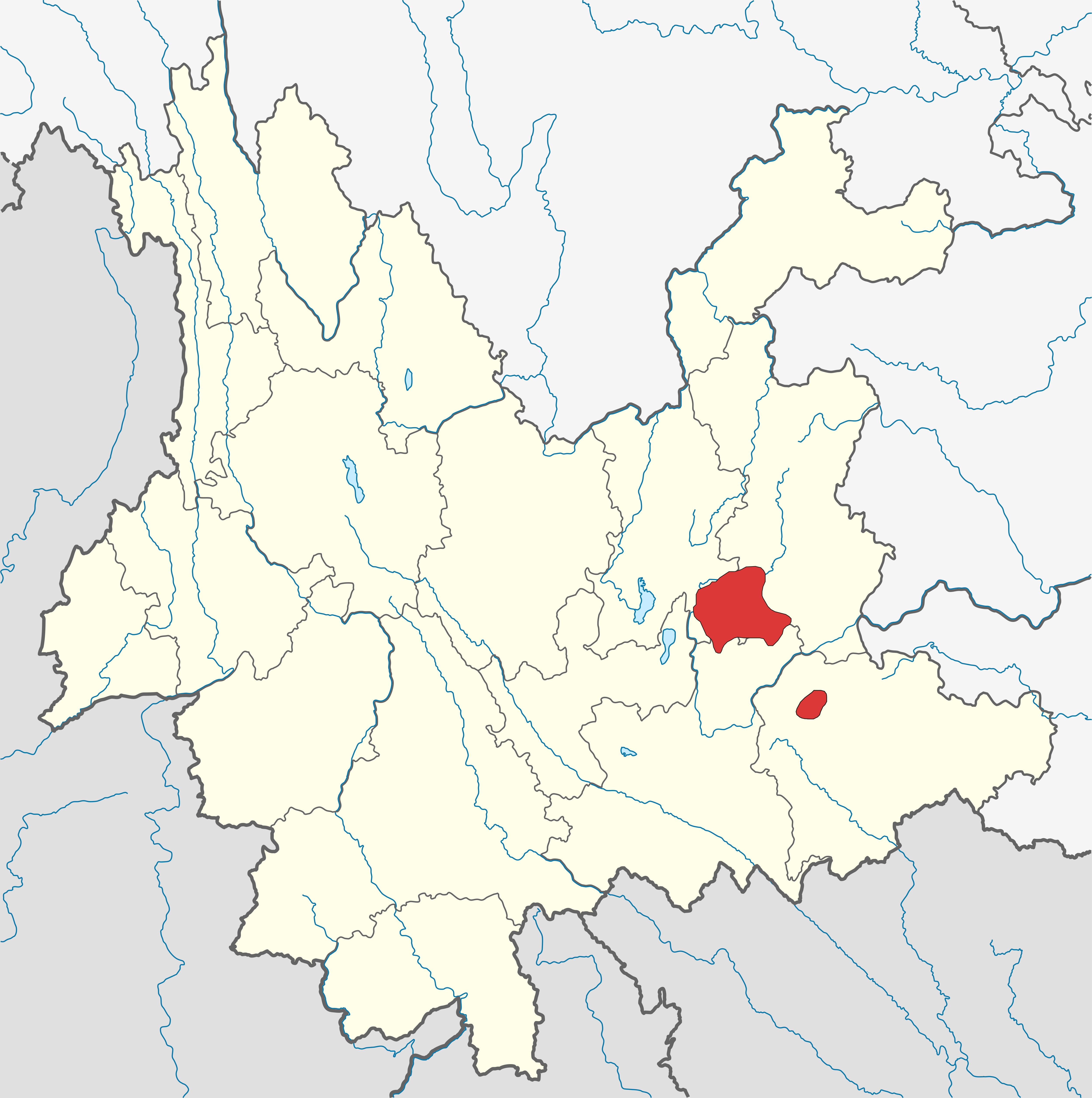 中文（中国大陆）: 彝族撒尼人分布图